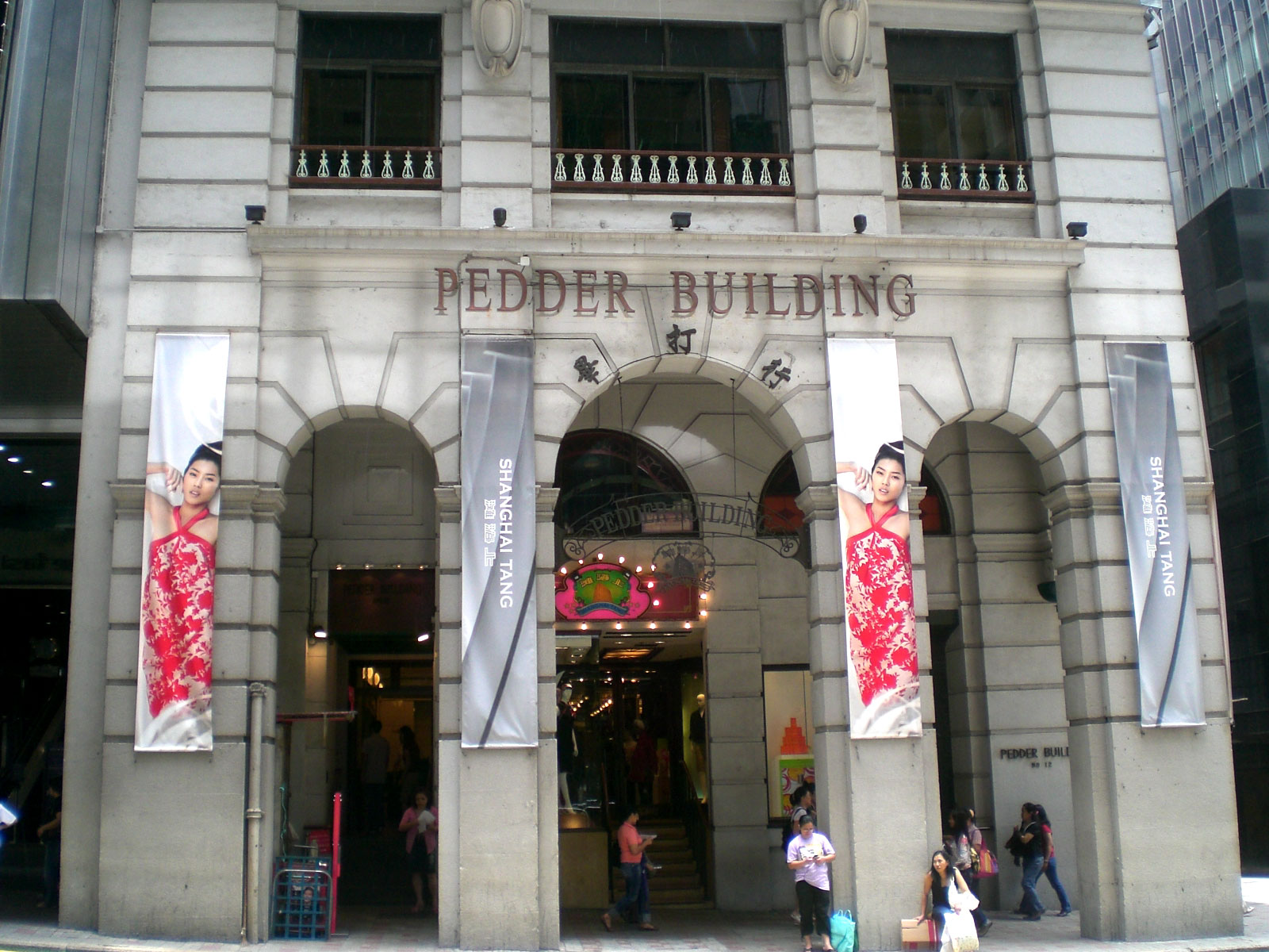 中環畢打街畢打行上海灘